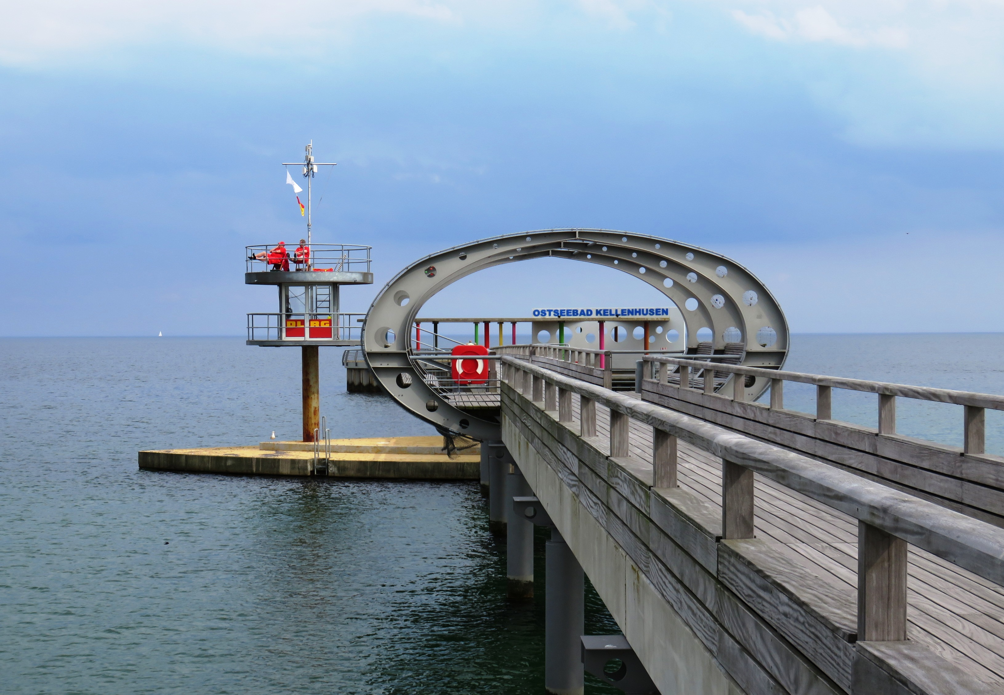 Die Seebrücke Kellenhusen mit einem Wachtturm der DLRG auf der Badeinsel